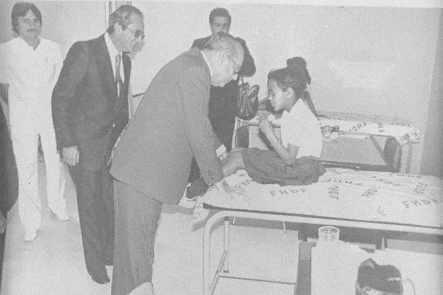 Imagem do Fundo Agência Nacional, do Arquivo Nacional